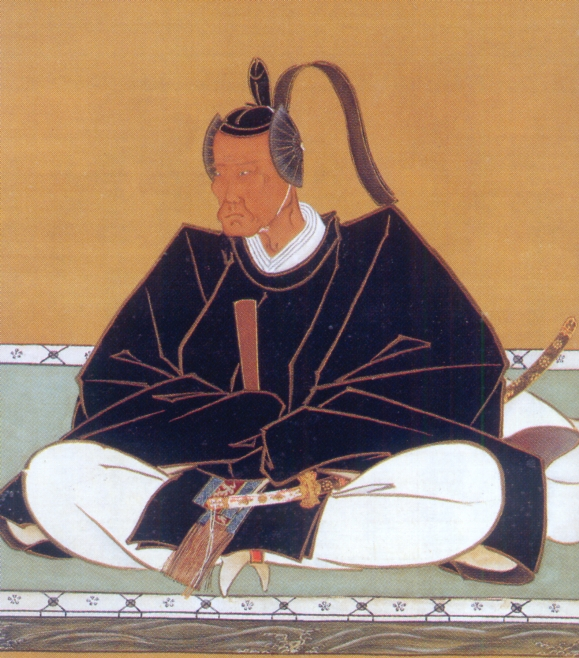 細川重賢画像 江戸時代の大名。肥後熊本藩第六代藩主。Shigekata Hosokawa is Daimyo at Edo Period.